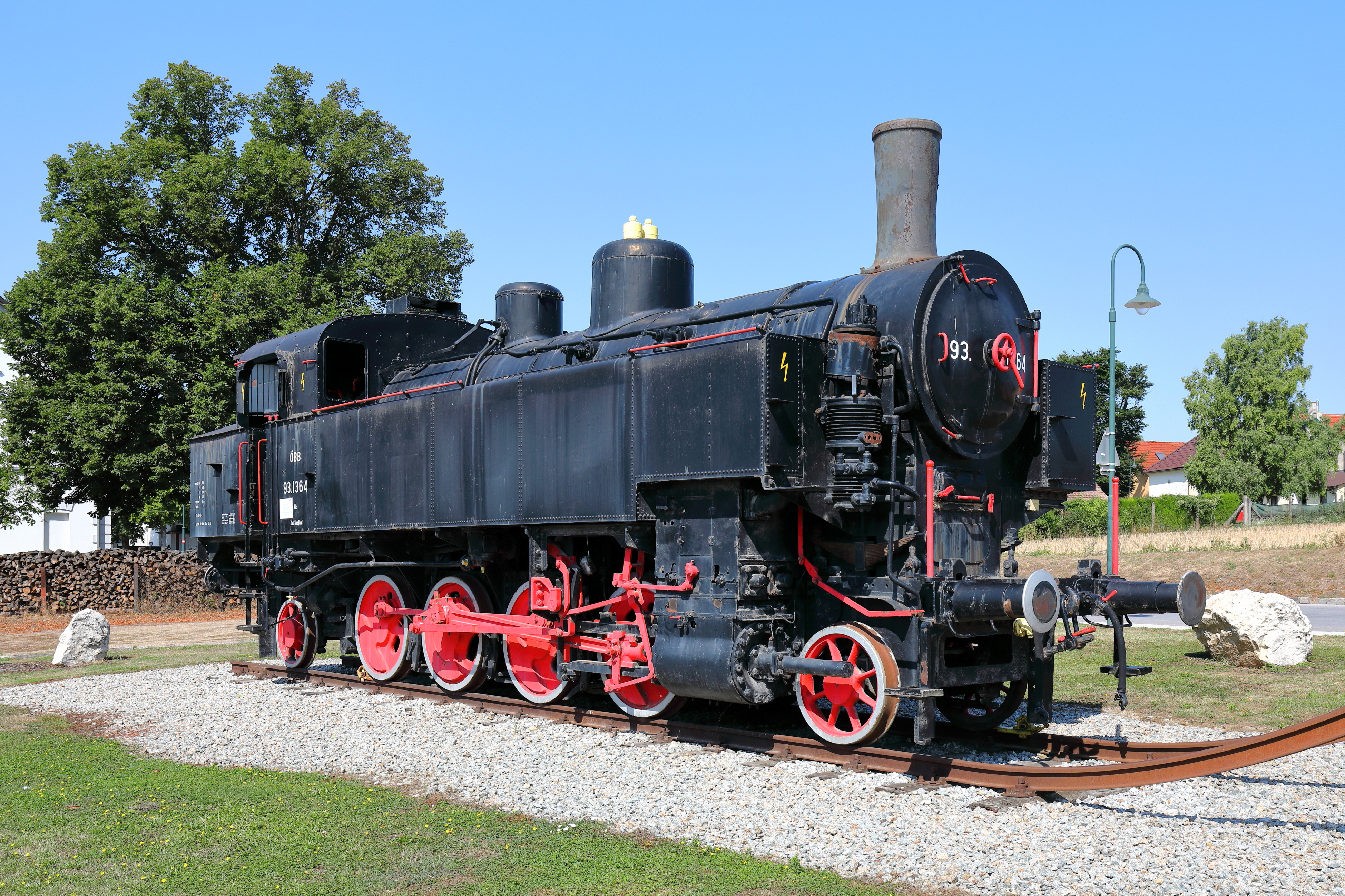 Die historische Dampflok ÖBB 93.1364 der Baureihe BBÖ 378 nordöstlich des Bahnhofes der niederösterreichischen Marktgemeinde Ernstbrunn (unmittelbar neben der Straße B6). Die Dampflok wurde 1927 mit der Fabriksnummer 2938 von der Lokomotivfabrik Floridsdorf gefertigt. 1977 erfolgte die Außerdienststellung, anschließend wurde sie in Hainfeld als Schaulok aufgestellt, ab 2004 restauriert und am 13. Mai 2010 feierlich beim Bahnhof Ernstbrunn "enthüllt".